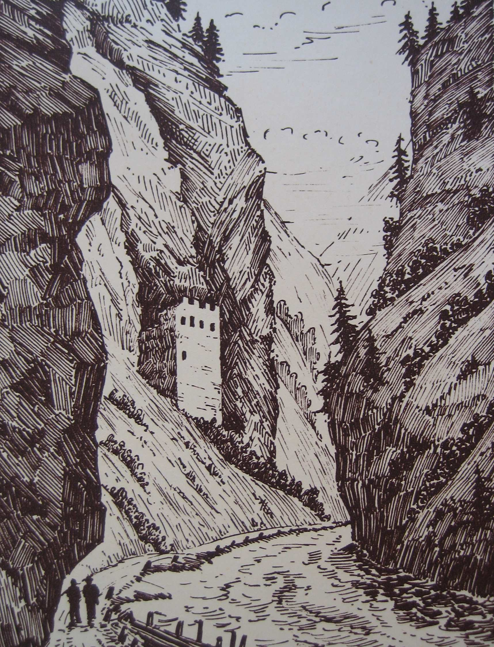 Burg Fracstein, nach einer Zeichnung von H. Kranek, 1830